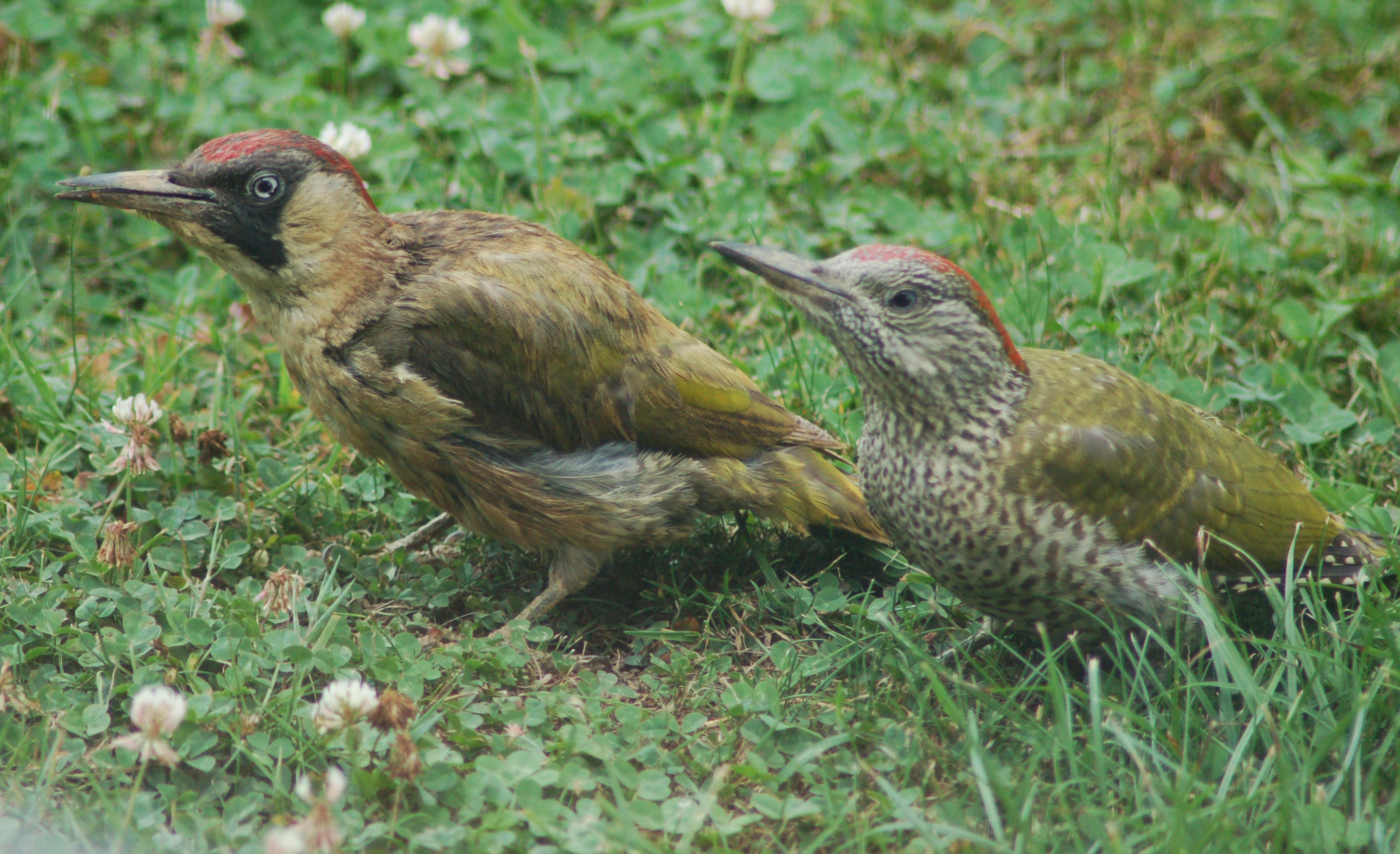 Picus viridis, Pic-Verts Femelle et Jeune